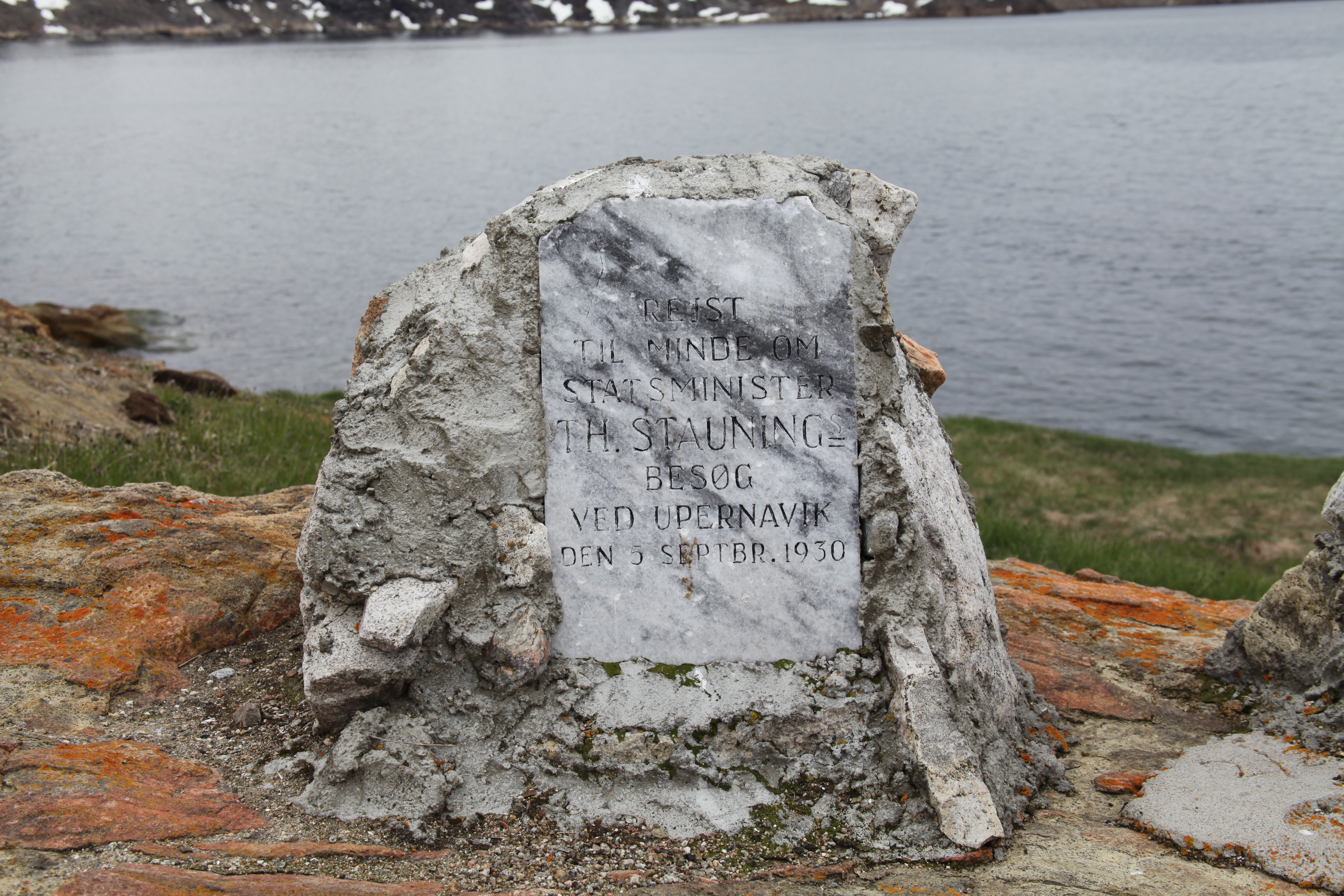 Upernavik